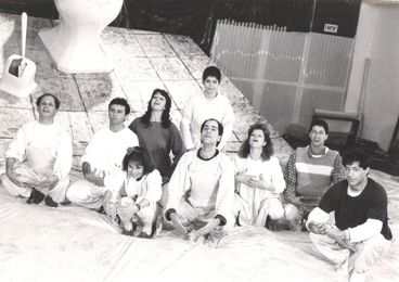 תפאורה של משה שטרנפלד לגן ריקי